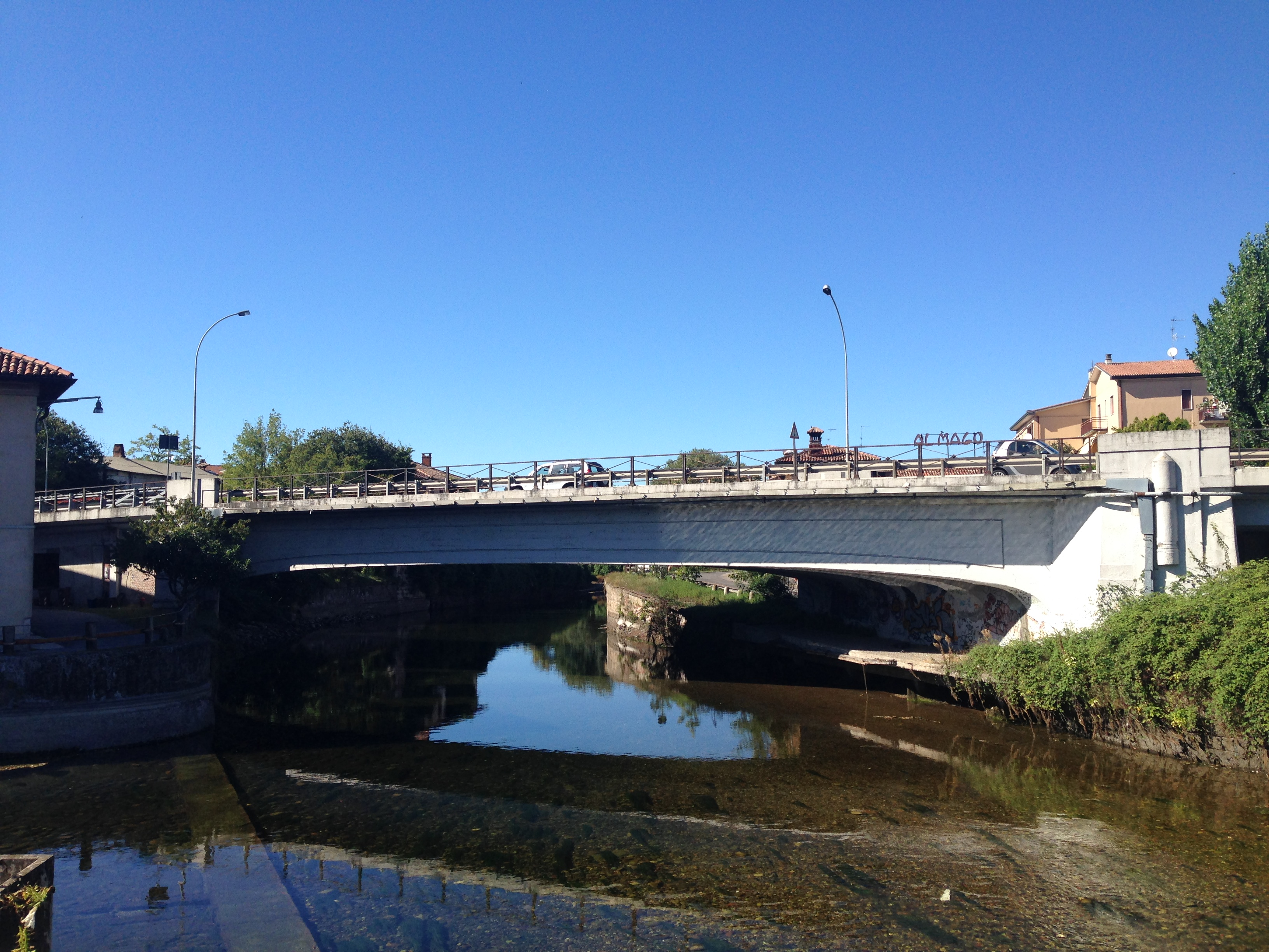 Castelletto - SS494 - Cavalcone Naviglio